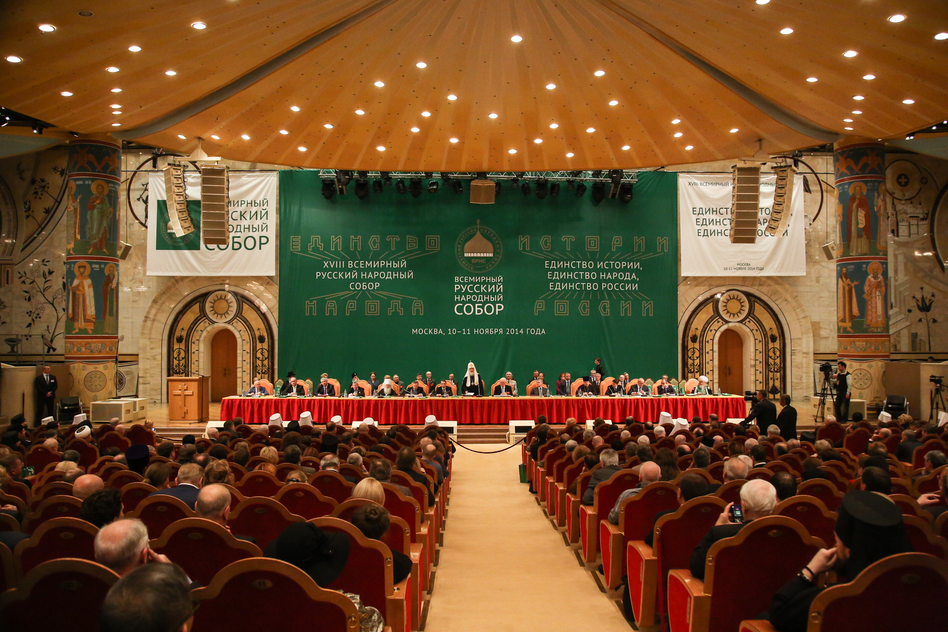 XVIII Всемирный Русский Народный Собор. 11 ноября 2014.